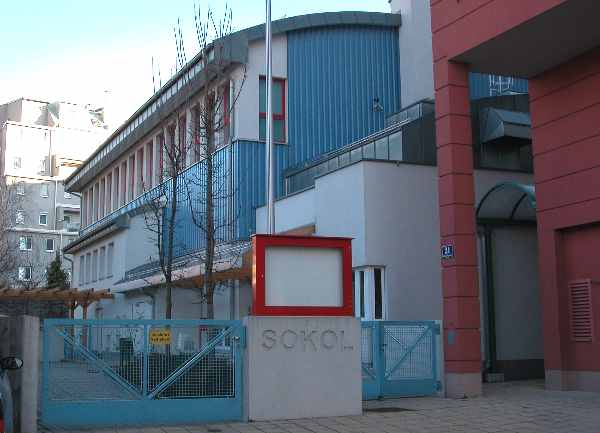 Sokolhaus in Wien 10, Angeligasse